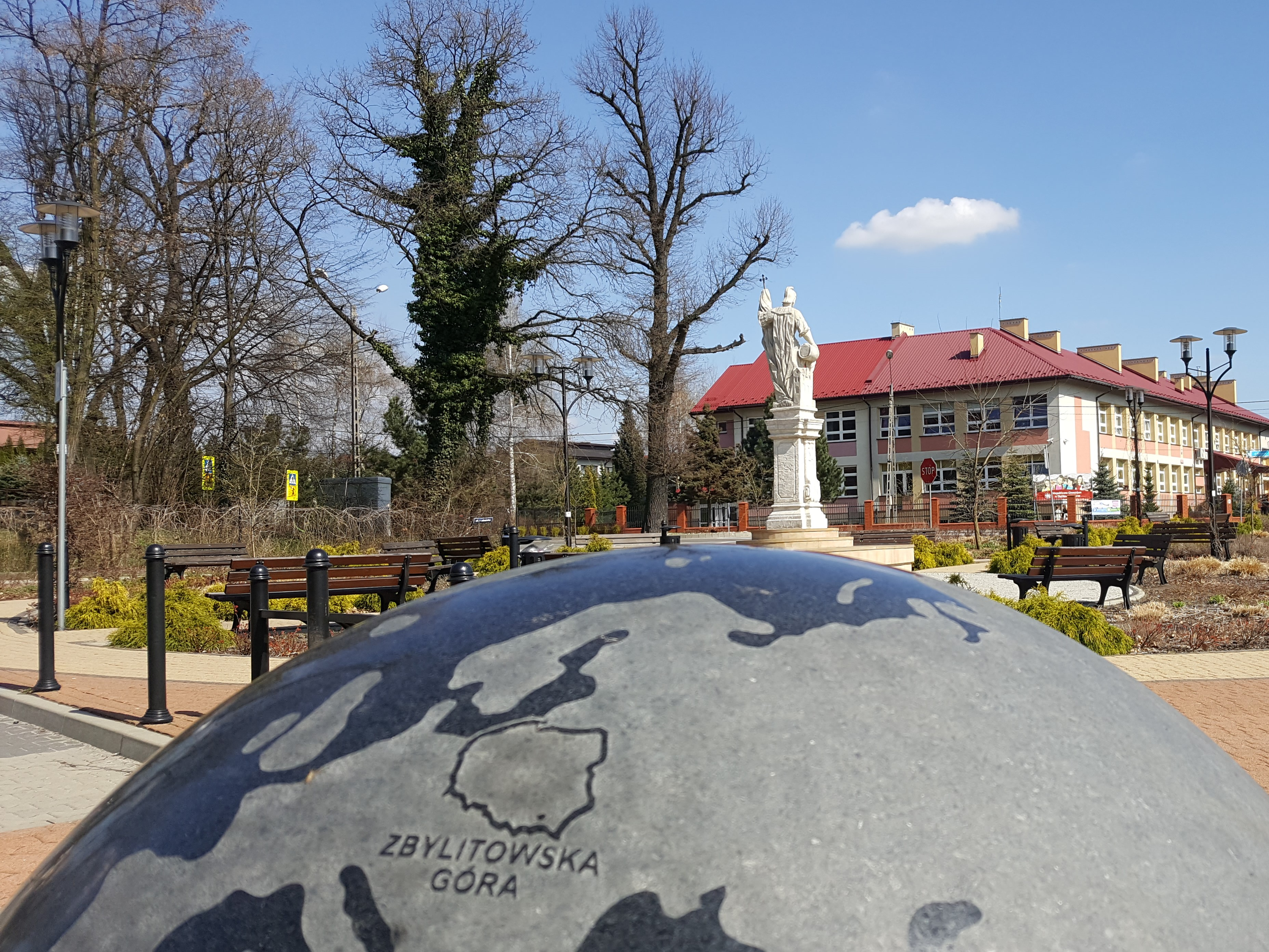 Plac św. Floriana w Zbylitowskiej Górze